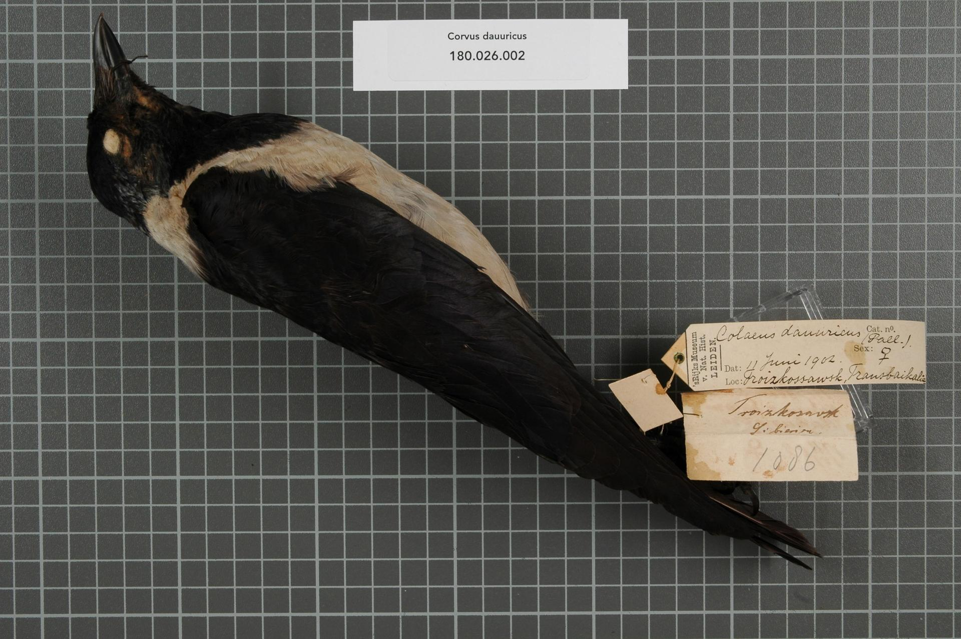 Corvus dauuricus Pallas, 1776